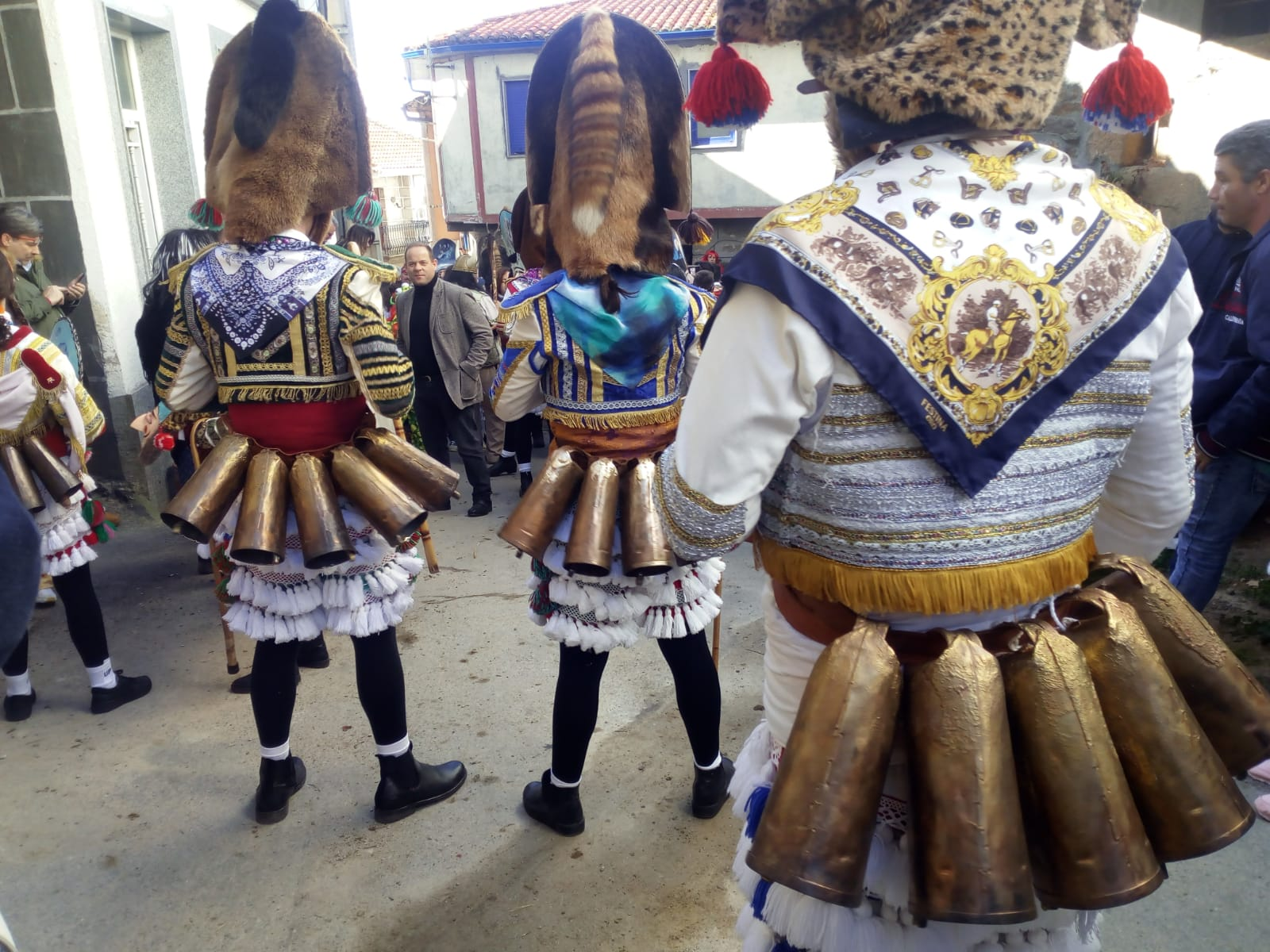 Chocas dos Felos.